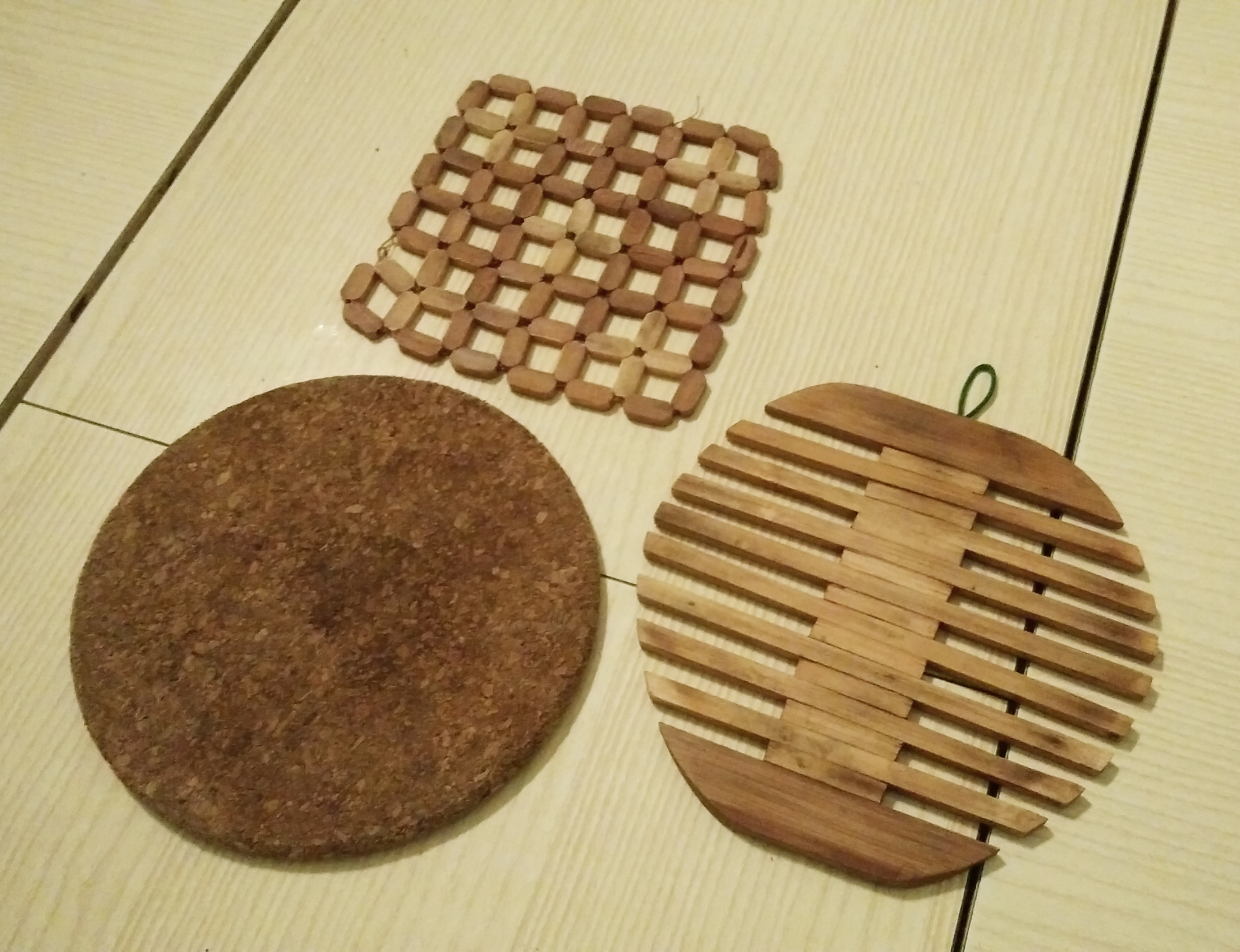 Tre sottopentole brutte su un tavolo.